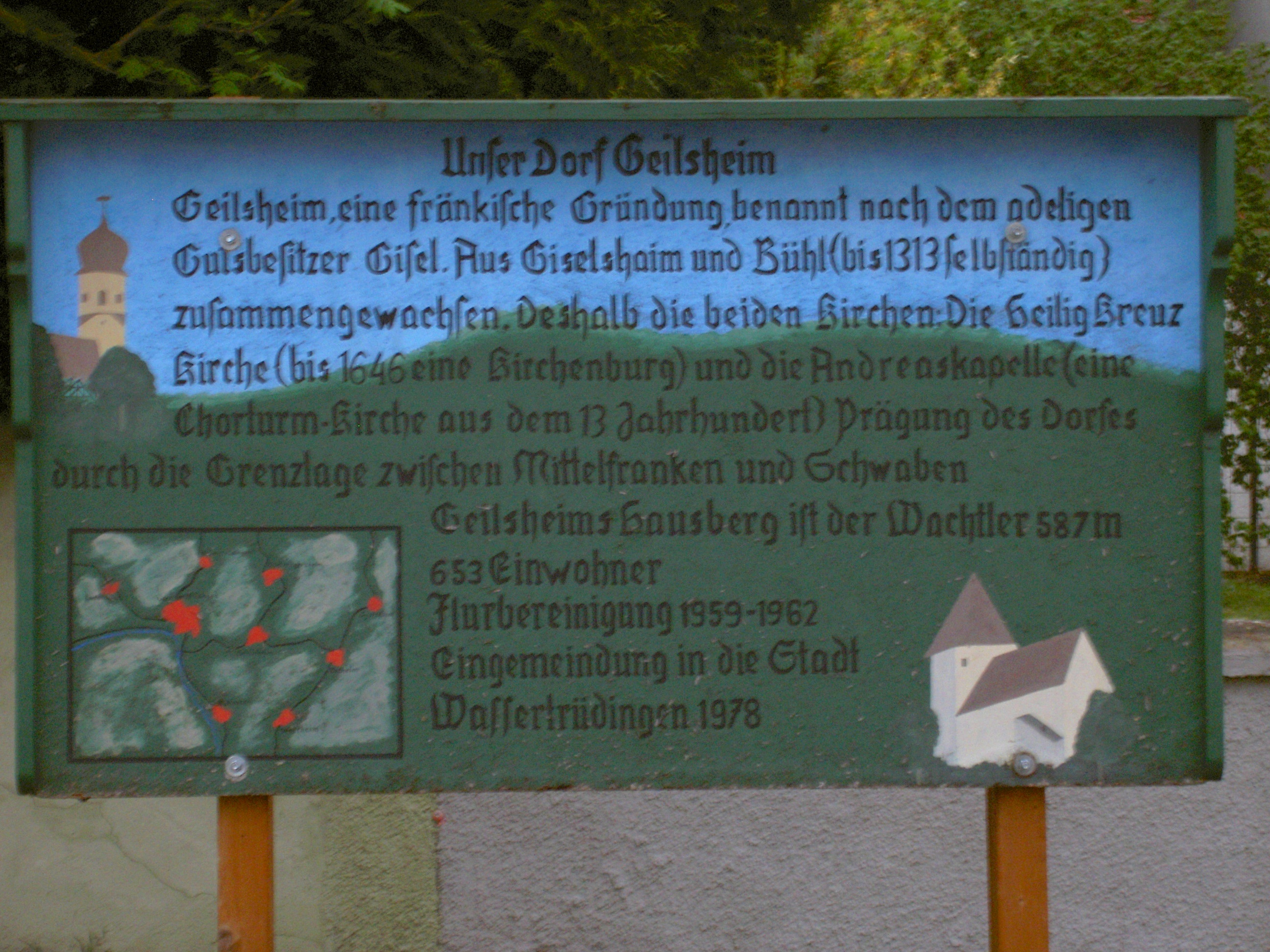 Informationstafel am Parkplatz unterhalb des Pfarrhauses.